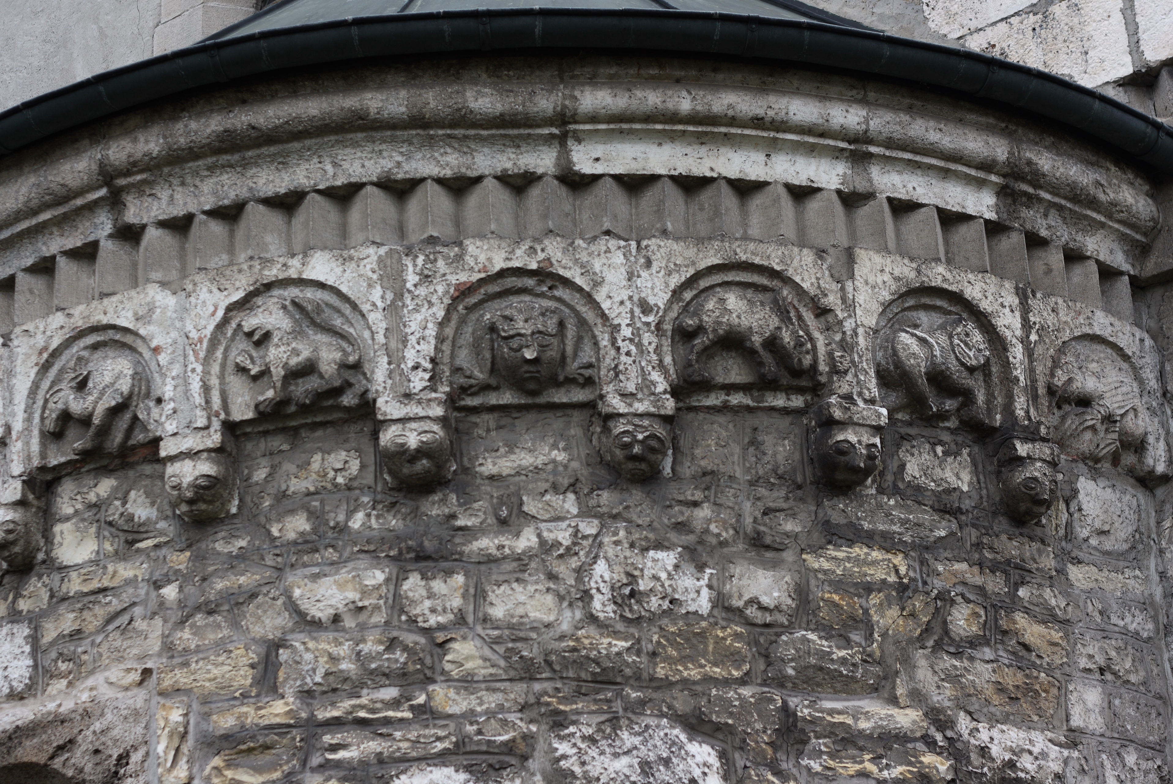 Evangelische Kirche St. Gallus in Brenz an der Brenz, einem Ortsteil von Sontheim an der Brenz (Baden-Württemberg), Bogenfries mit Reliefplatten